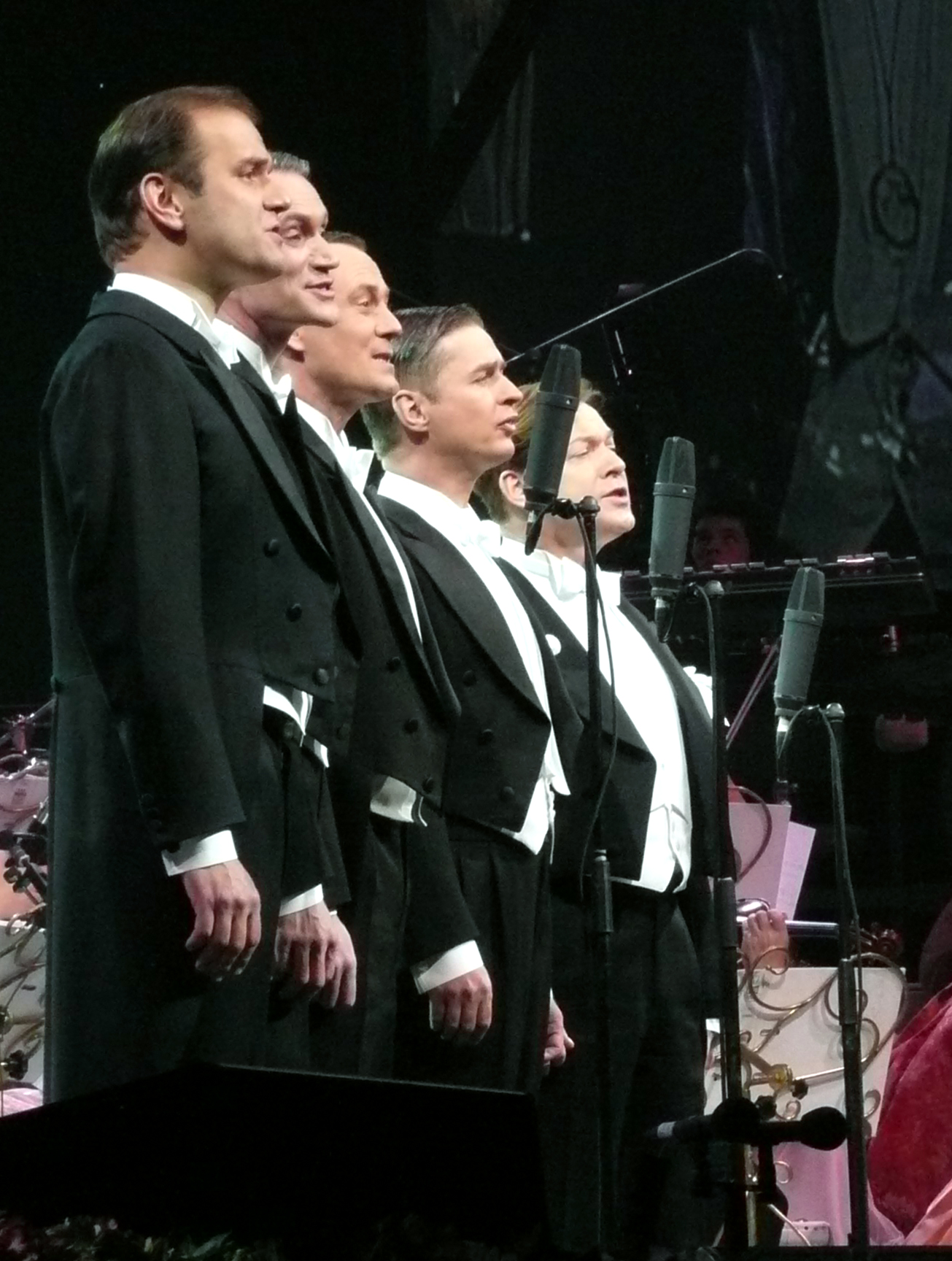 Die Sänger der Berlin Comedian Harmonists beim Konzert von Andre Rieu am 02.01.2010 in Köln